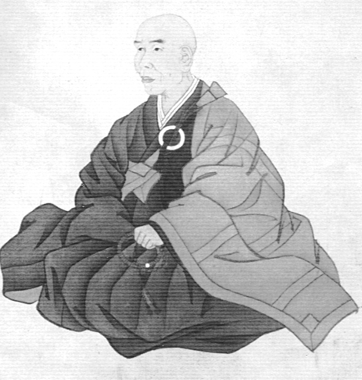 安田田麒筆 白雲上人像 絹本着色 秋田県指定文化財